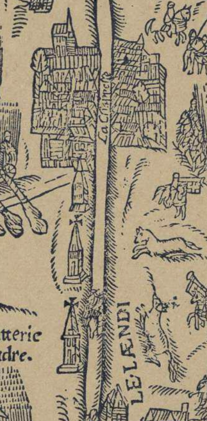 Récit de la bataille de 1567 entre Paris et Saint-Denis par Jean Le Maistre. Plan d'organisation du champ de bataille. Image réduite d'après l'estampe originale sur bois de Jean Le Maistre, 1570.